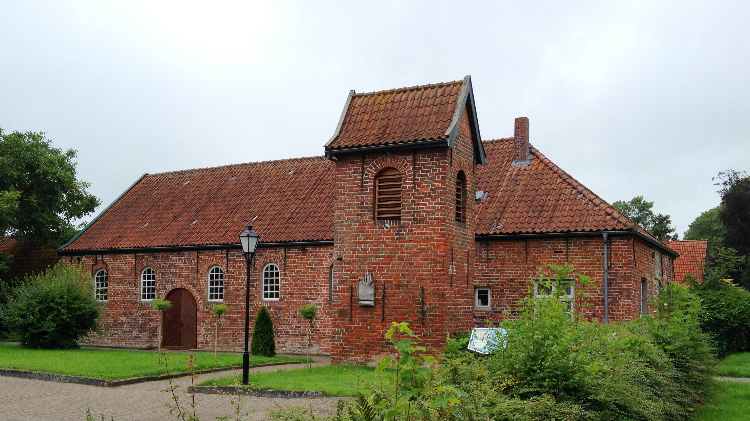 Neustadtgödens, kath. Kirche St. Josef